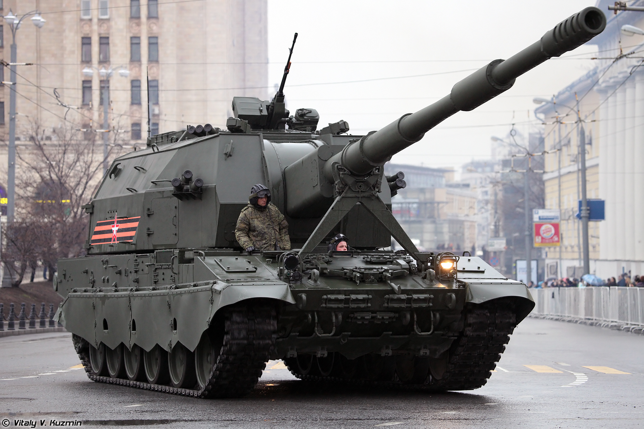 САУ 2С35 Коалиция-СВ (Self-propelled gun 2S35 Koalitsiya-SV)